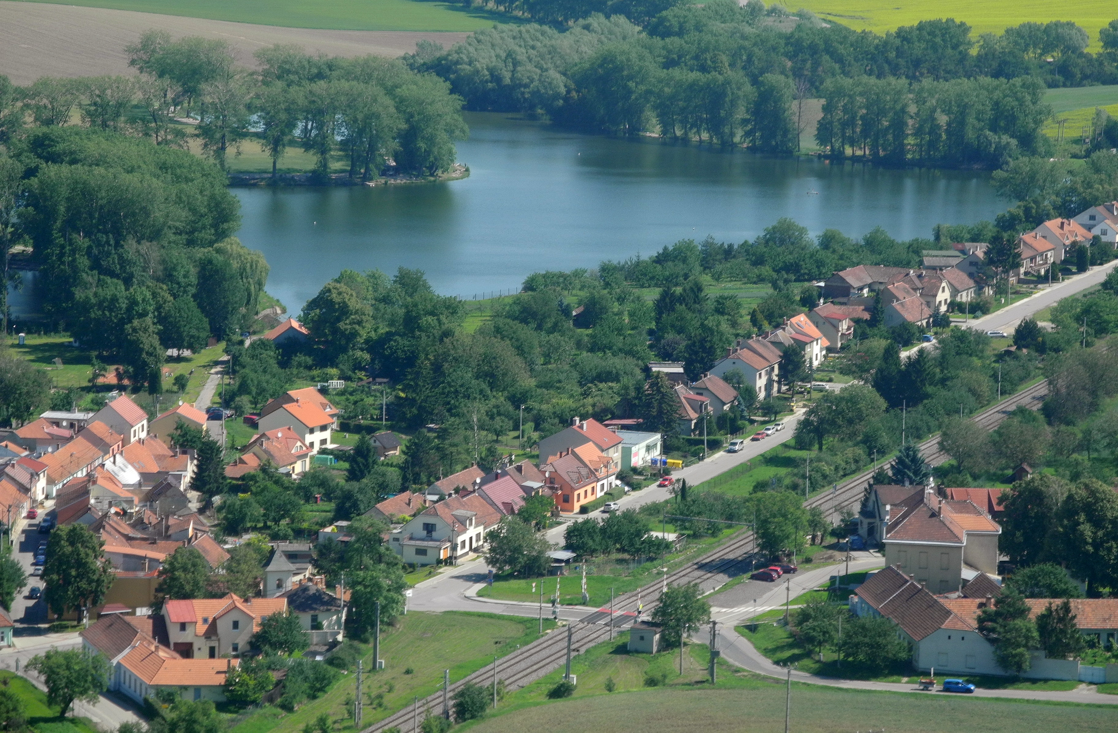 Ponetovice